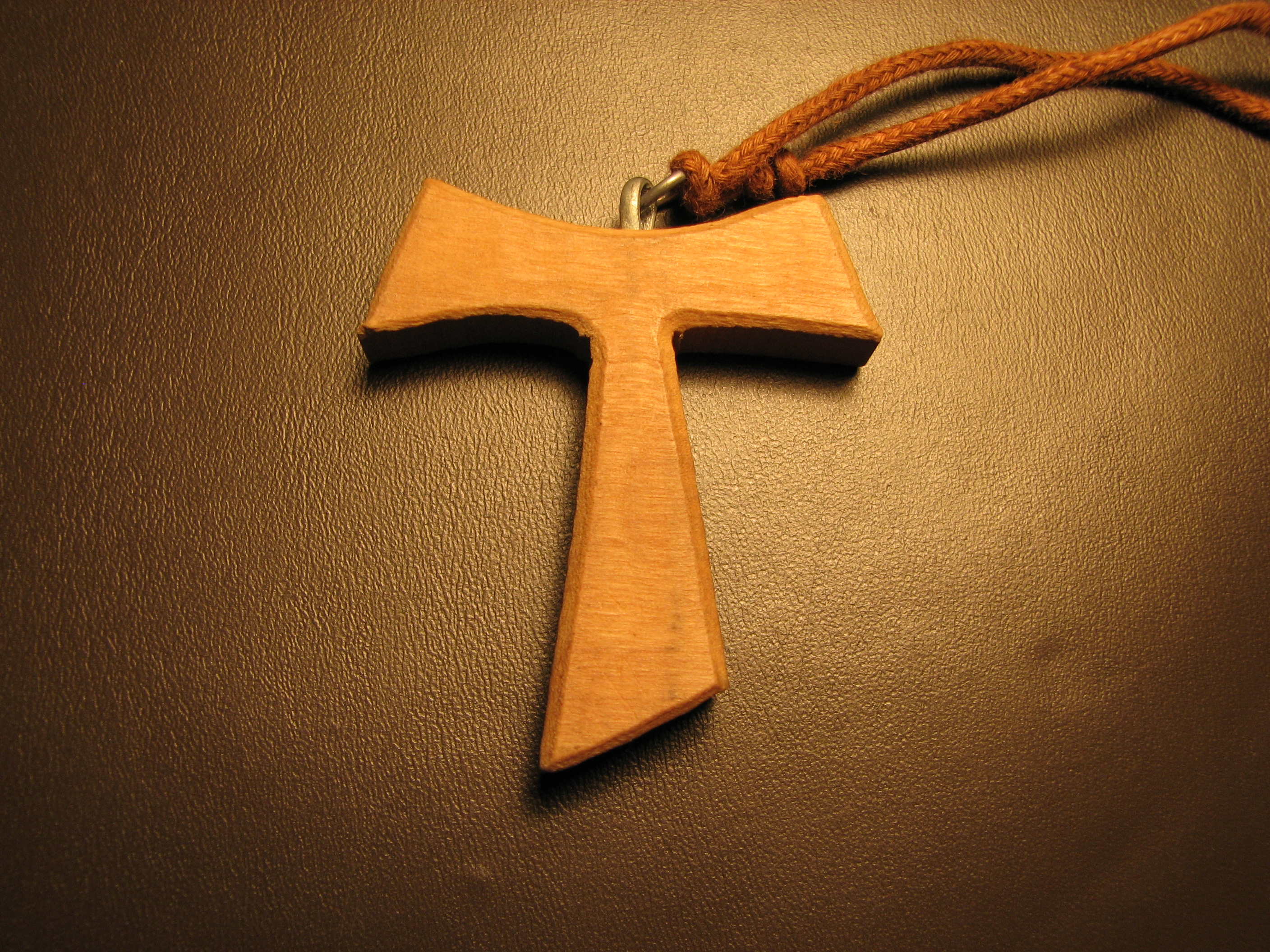 Franciscan Tau